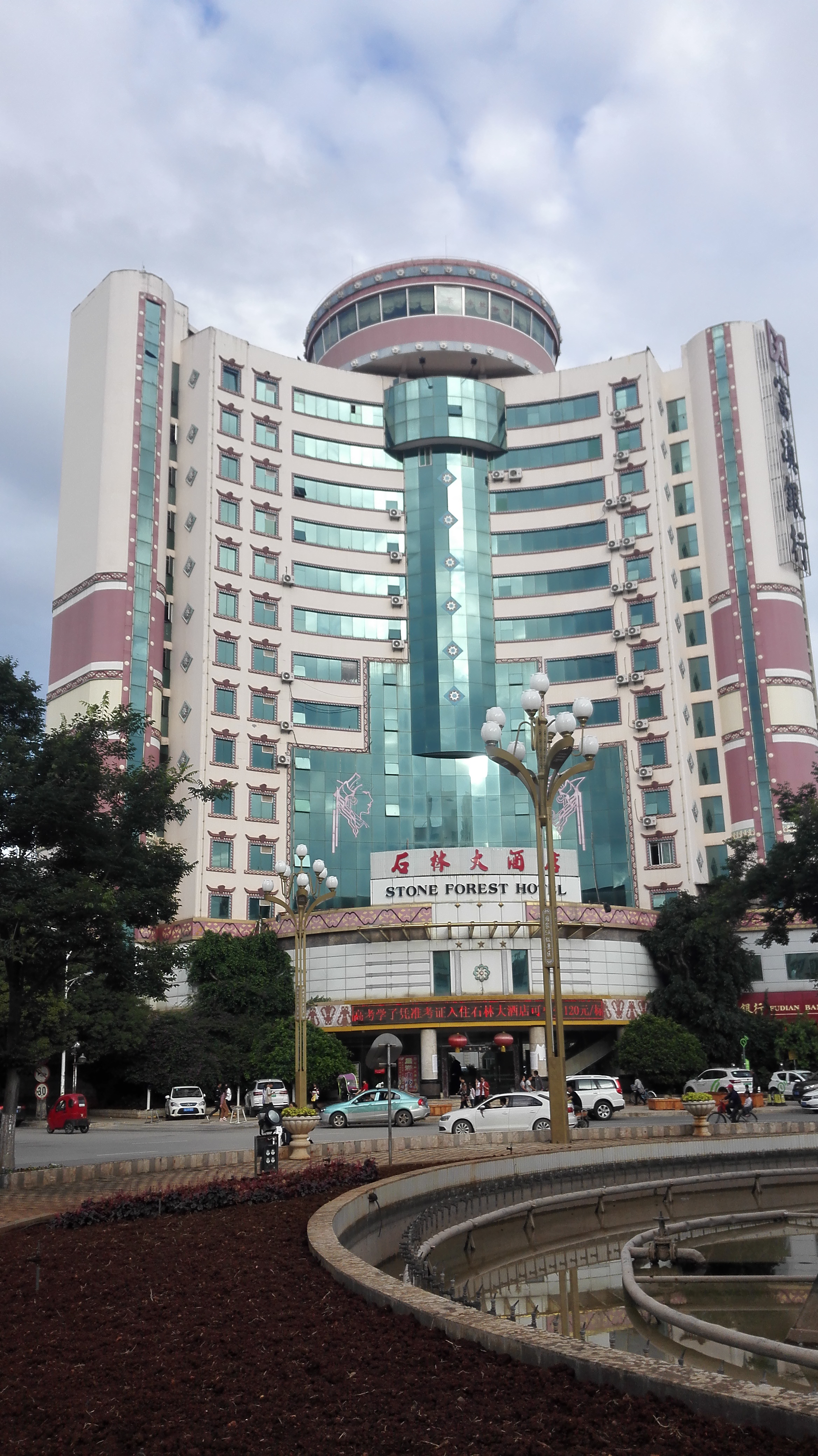 中文（中国大陆）: 石林大酒店